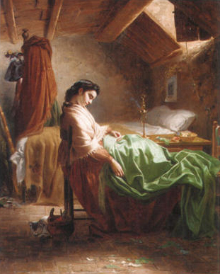 "La ricamatrice addormentata", olio su tela, 63.5 x 62 cm., coll. privata